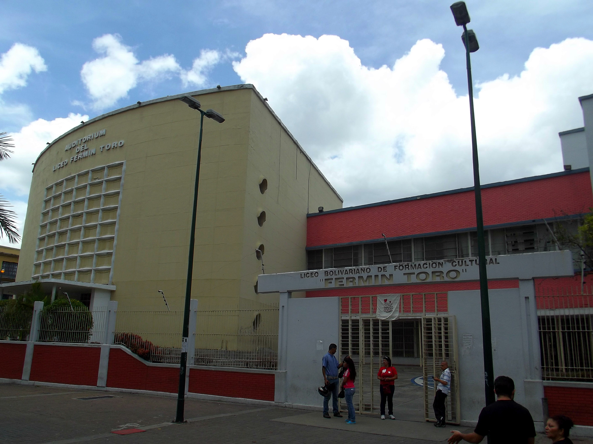 Liceo Fermín Toro